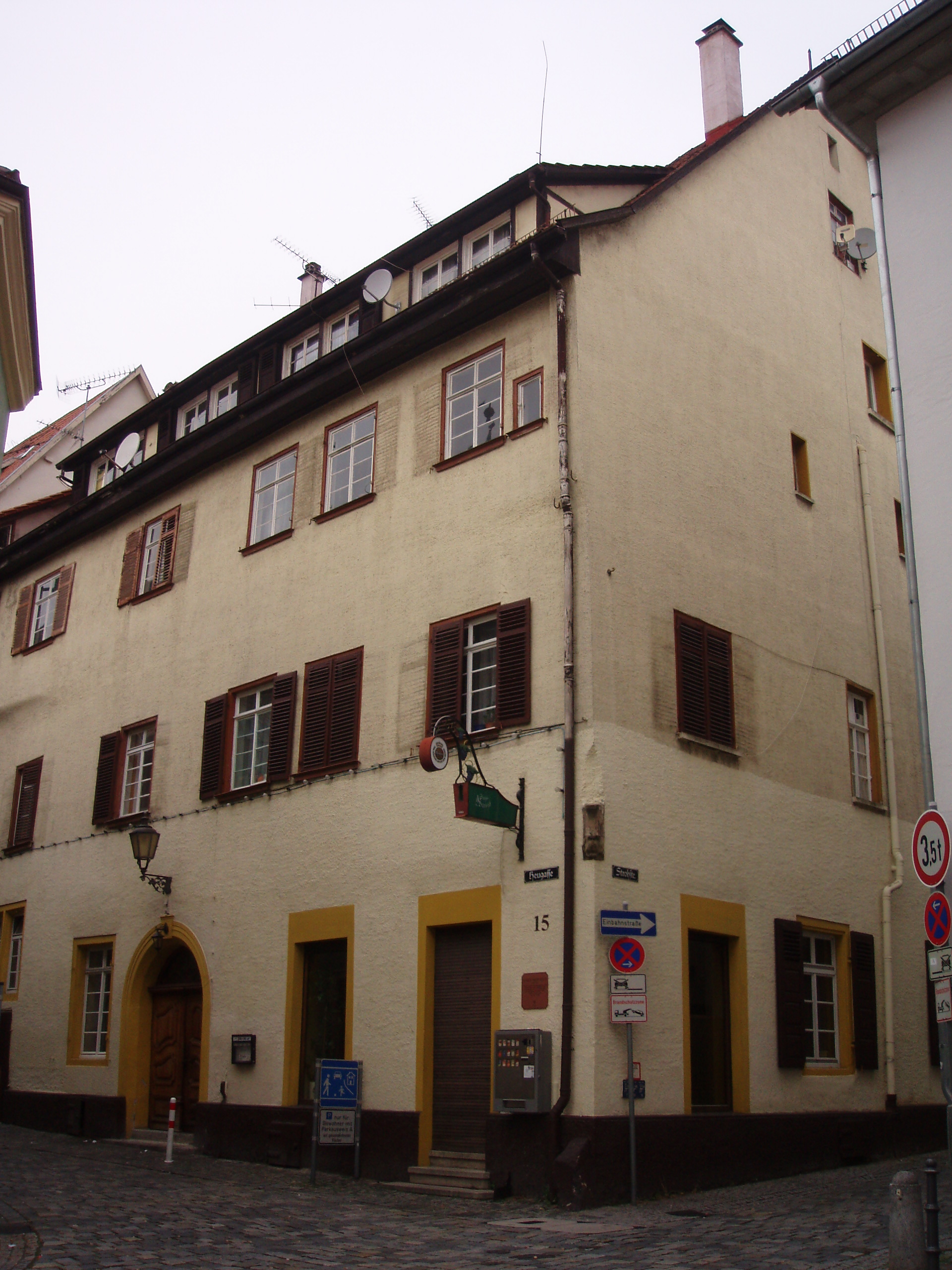 Haus, in dem Julius Motteler lebte